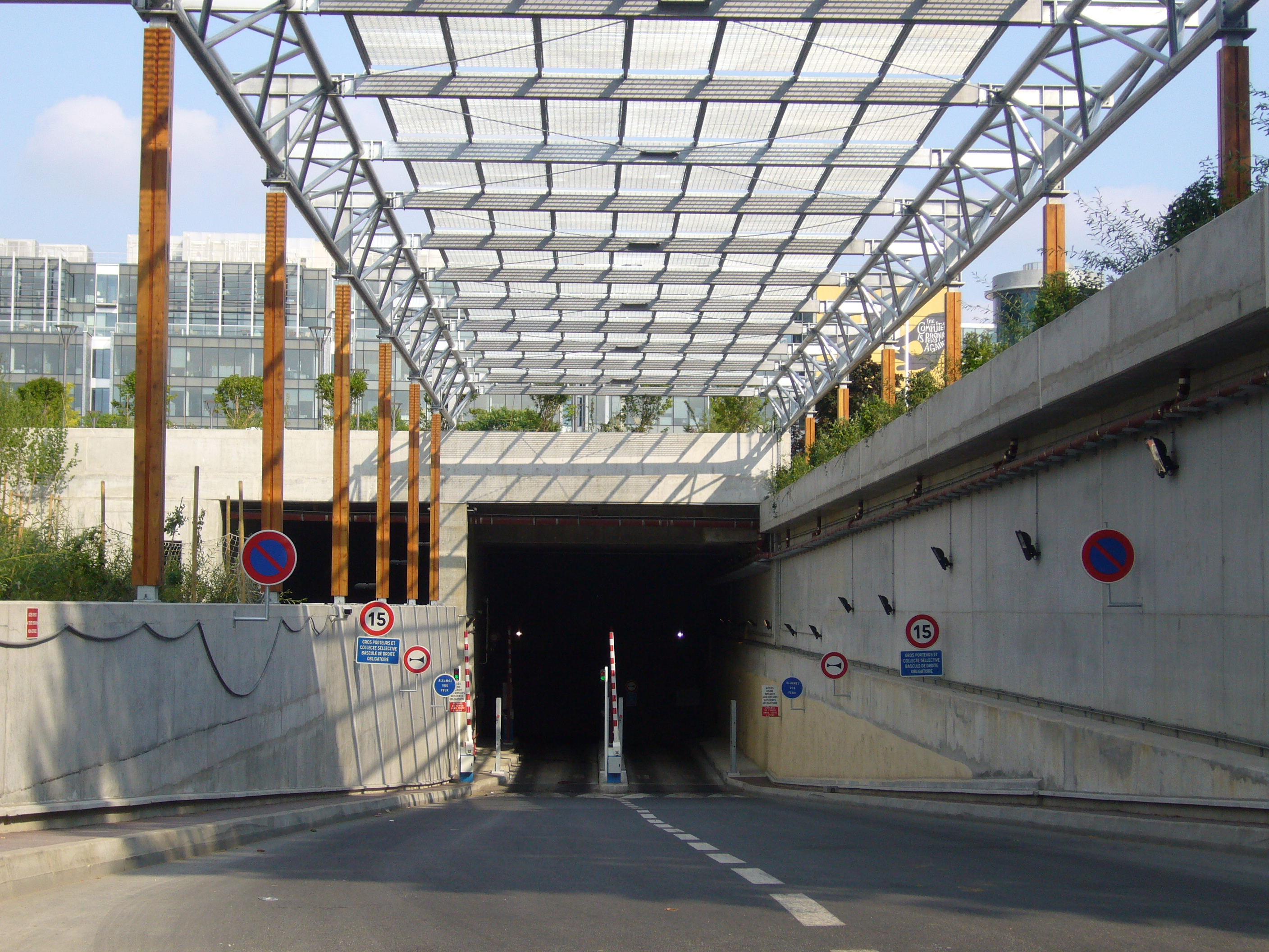 Entrée des bennes à ordures menant au centre de traitement des déchets ménagers Isséane.